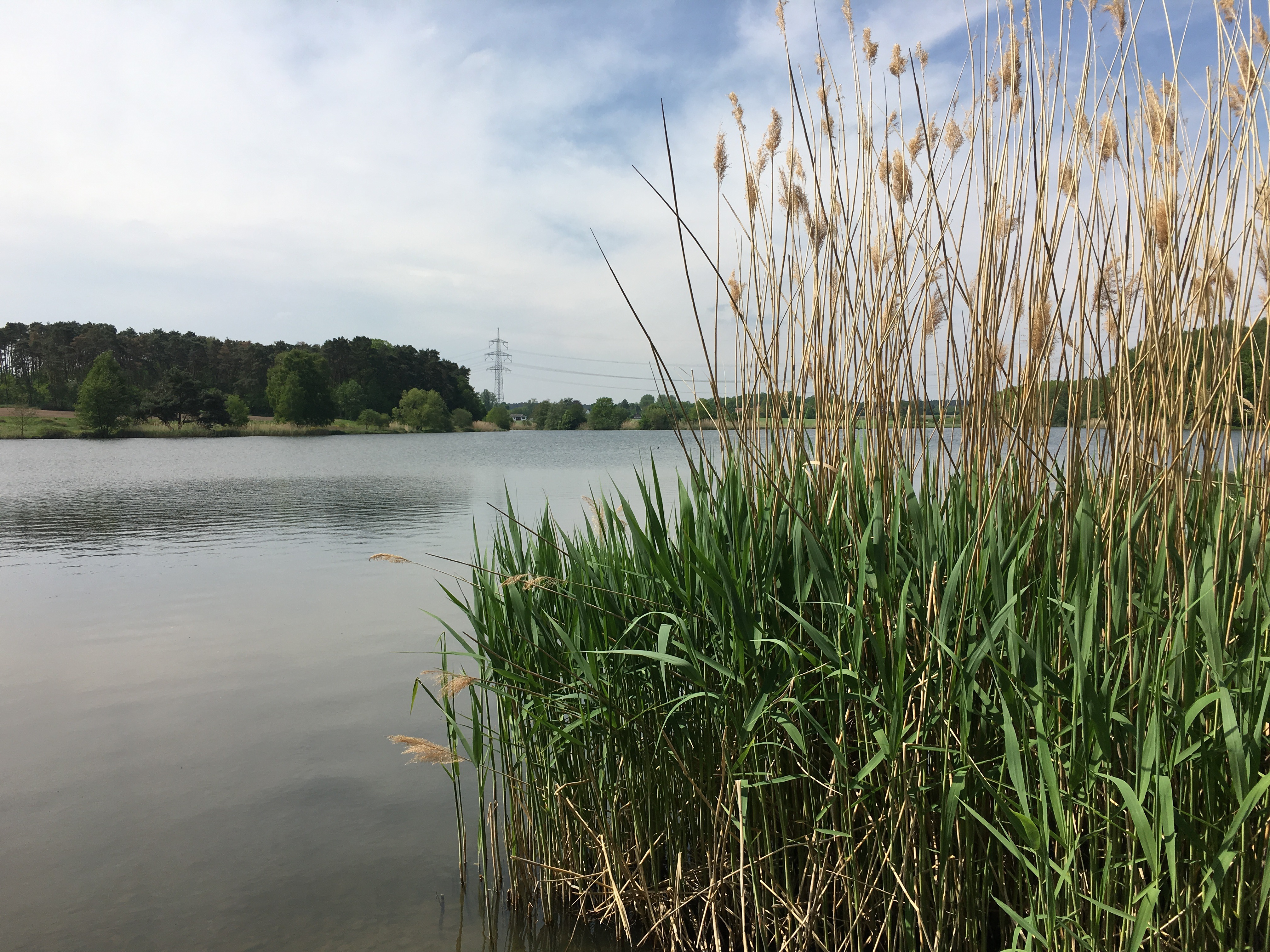 (LSG:BY-LSG-00340.10)_Steinforstgraben mit Kosbacher Weihern und Dauerwaldstreifen östlich des Main-Donau-Kanals